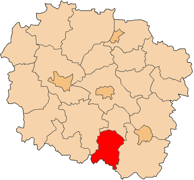 Powiat radziejowski na mapie województwa kujawsko-pomorskiego.